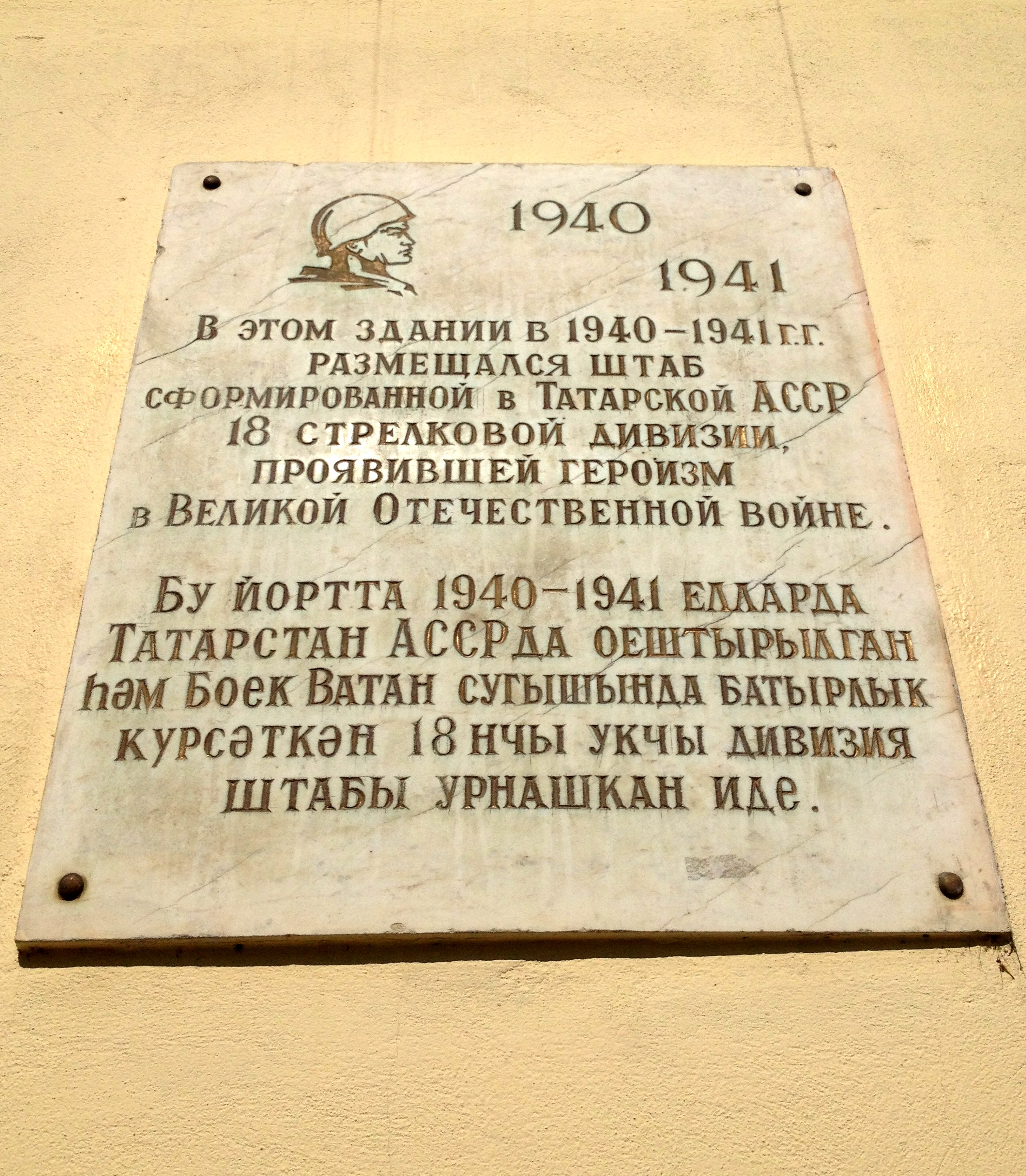 Дом, в котором располагался в период формирования штаб 334 витебской ордена суворова стрелковой дивизии: улица Карла Маркса, 9/15, Казань, Татарстан